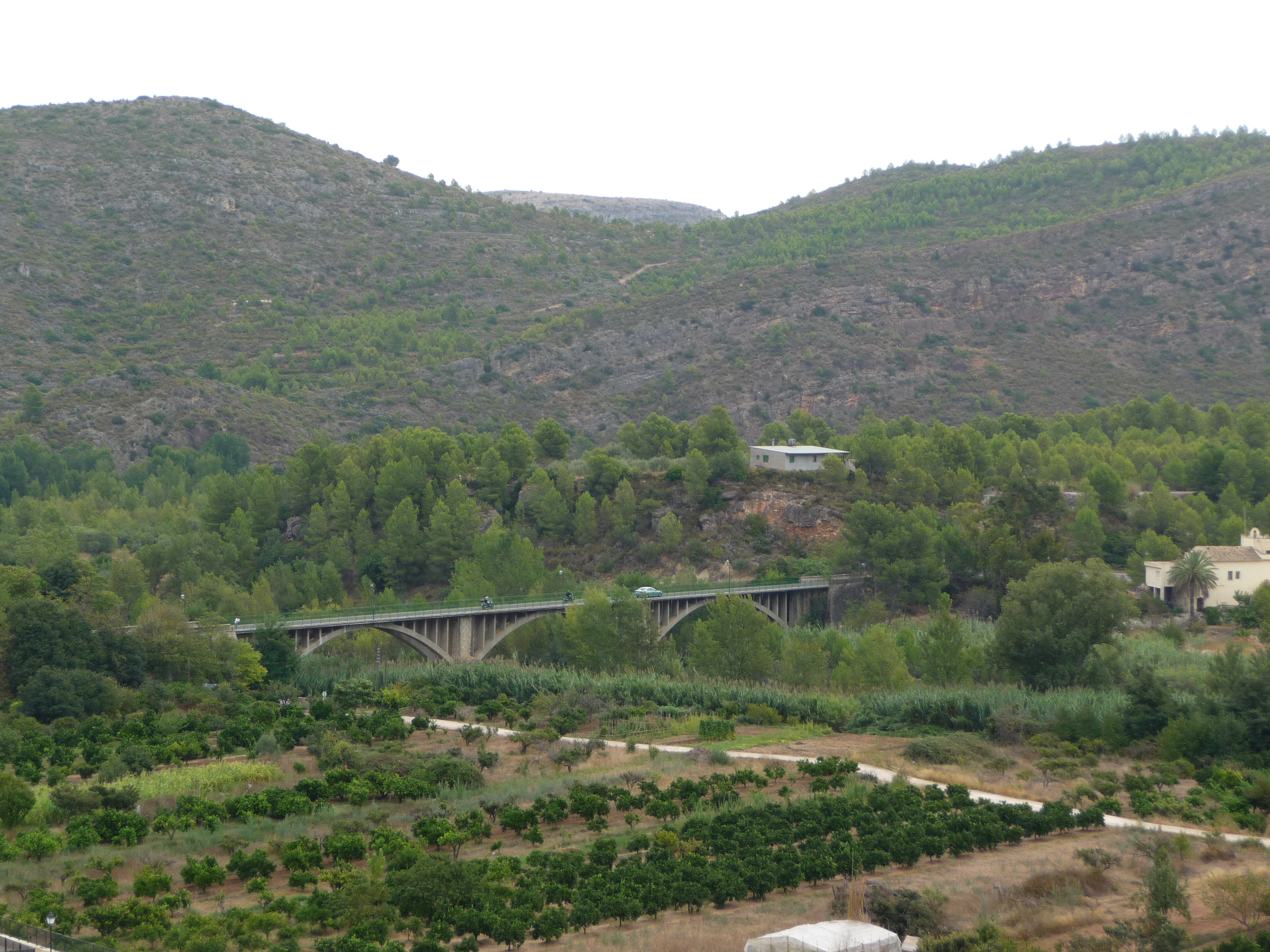 Alrededores de Toga This is a photography of a Special Area of Conservation in Spain with the ID: ES5222004. Natura2000 entry, EEA entry